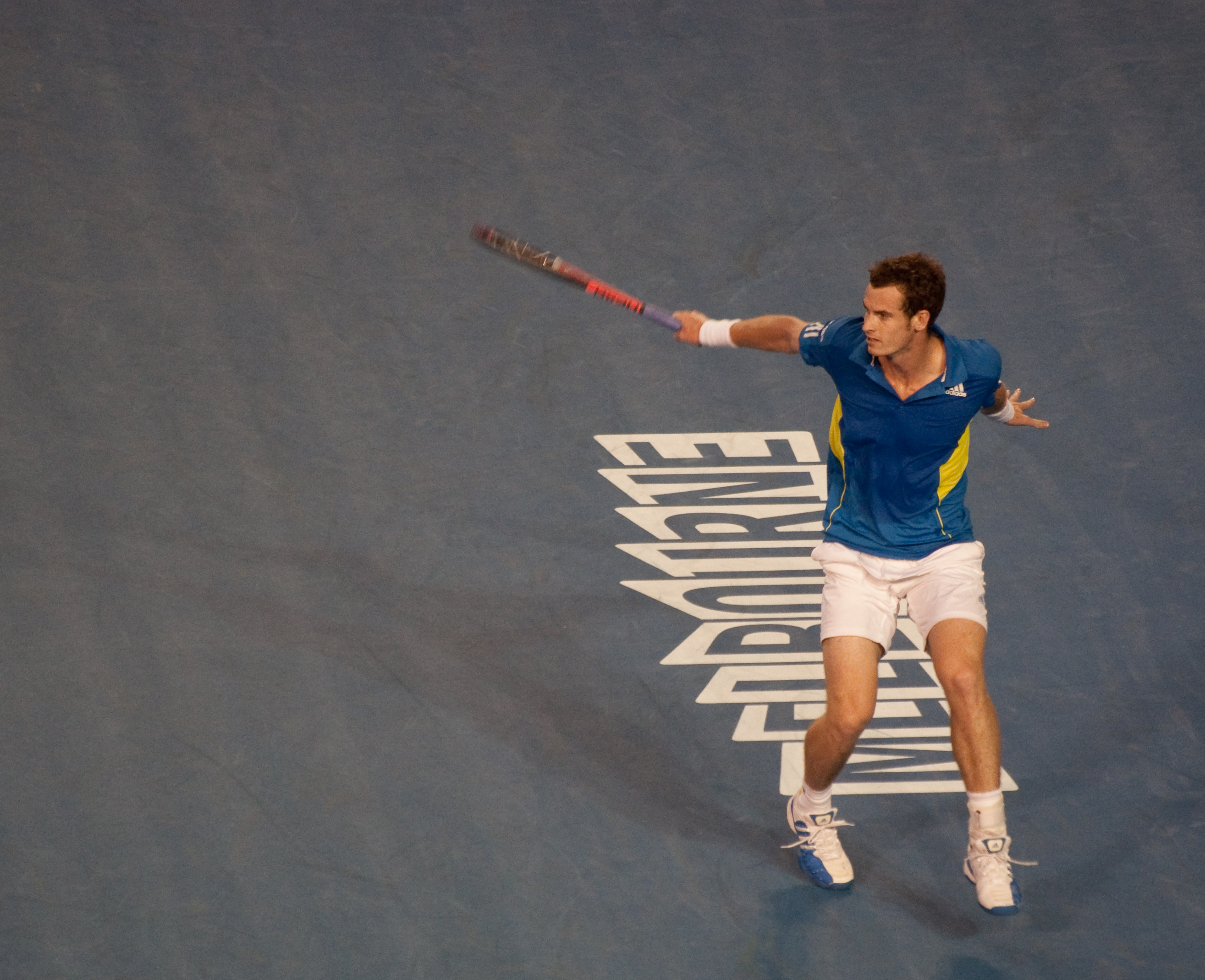 Australian Open 2010 Quarterfinals Nadal Vs Murray